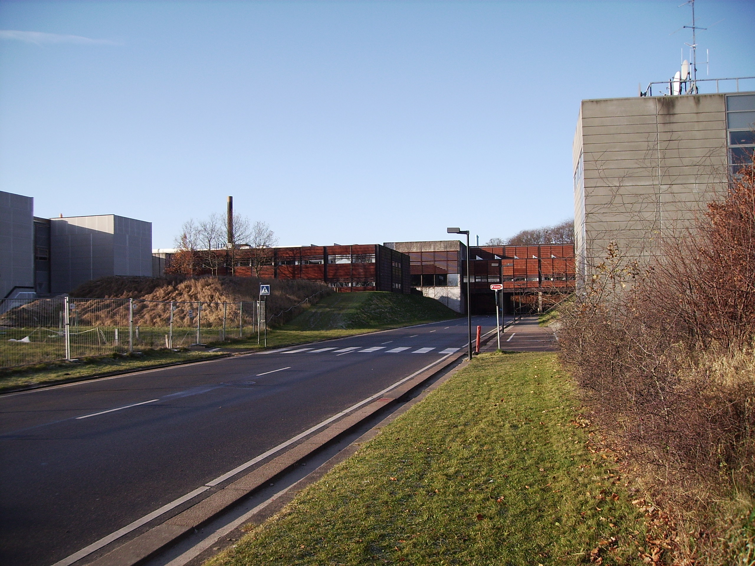 Syddansk Universitet i Odense fra øst (University of Southern Denmark Campus Odense)